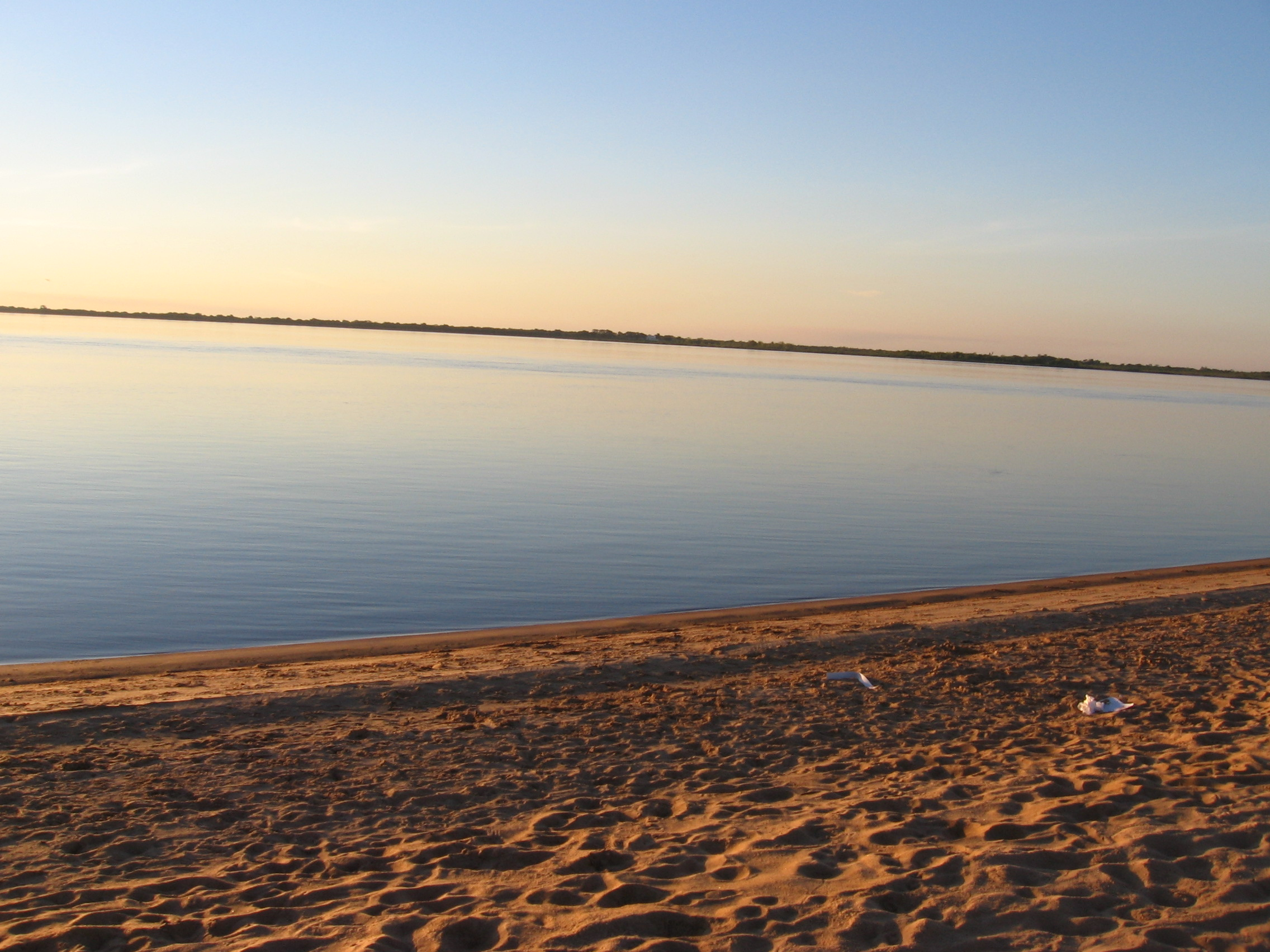 Río Paraná frente a la costa de Paso de la Patria